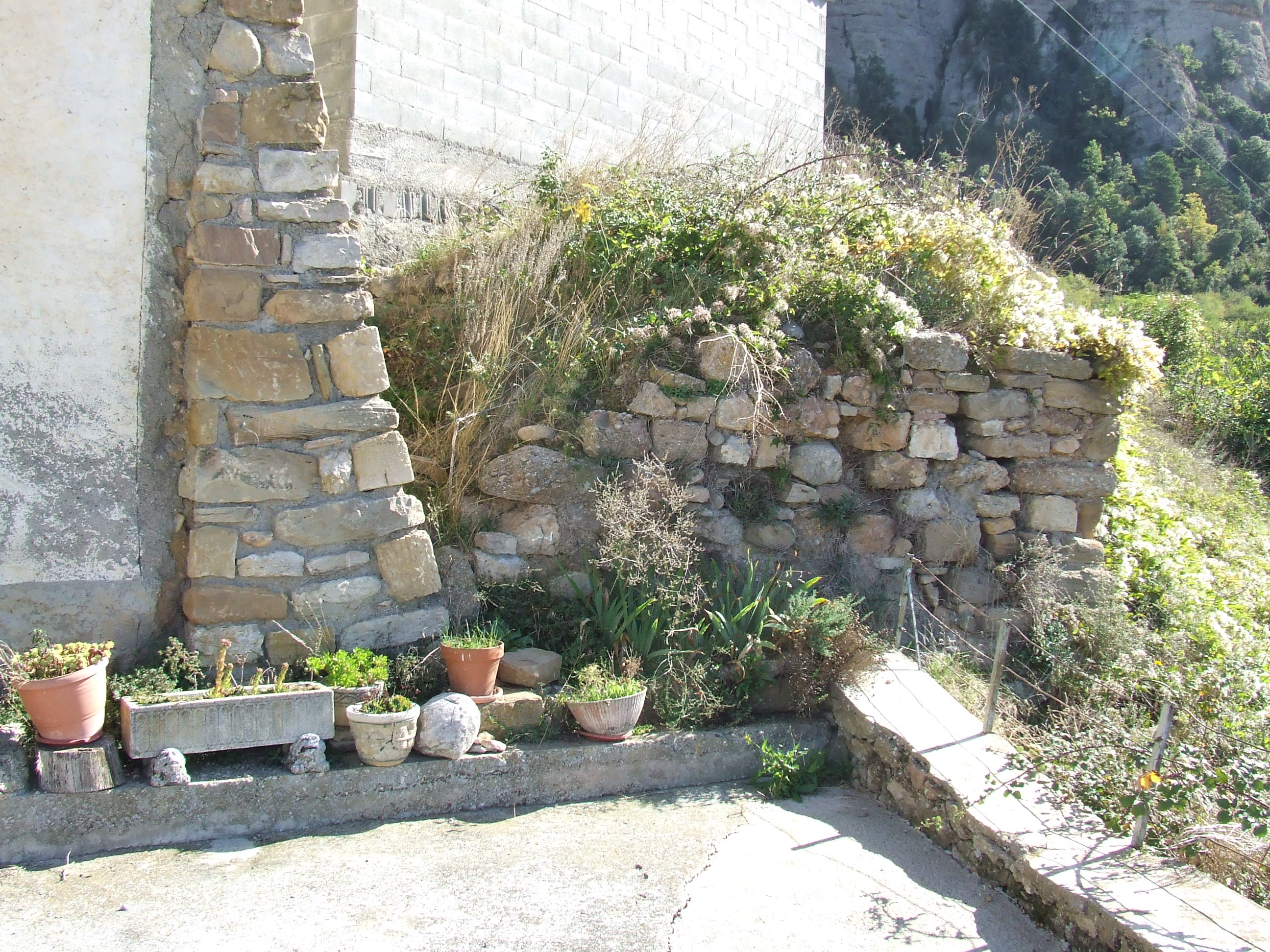 Restes del castell de Benavent de la Conca (Isona i Conca Dellà, Pallars Jussà)